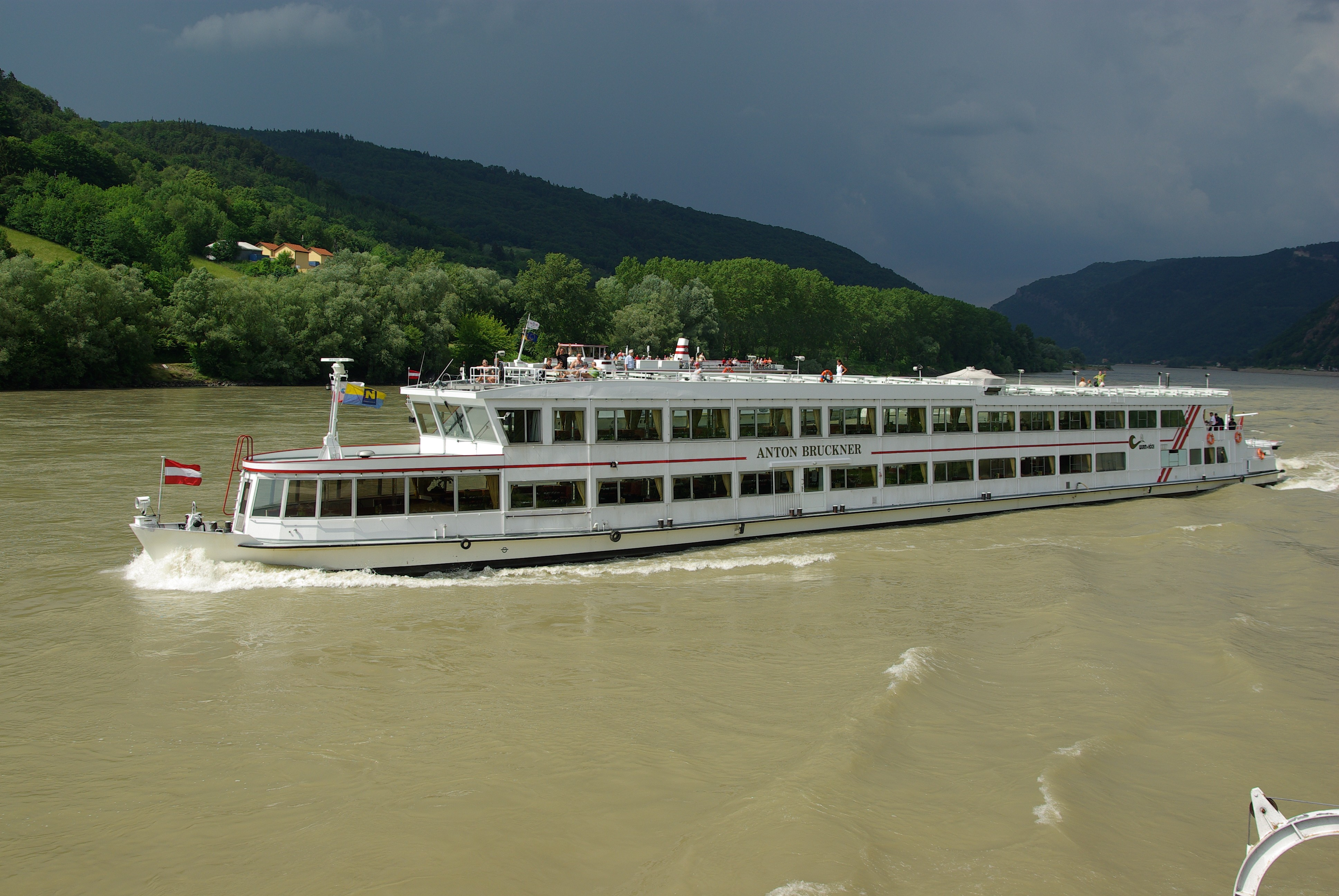 Das Passagierschiff MS Anton Bruckner auf der Donau bei Aggsbach (Niederösterreich).